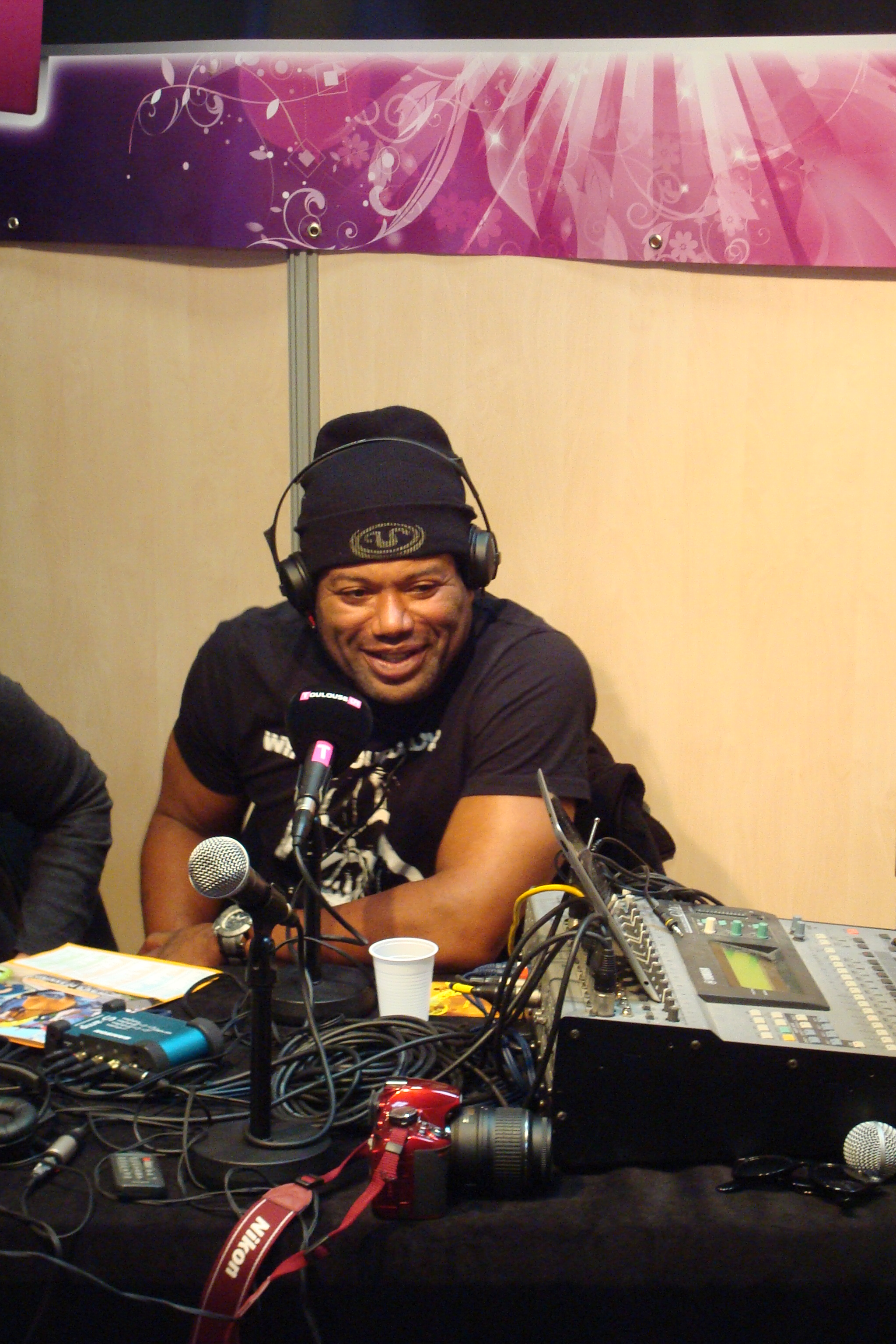 Christopher Judge lors d'une interview radio pendant le Toulouse Game Show 2012